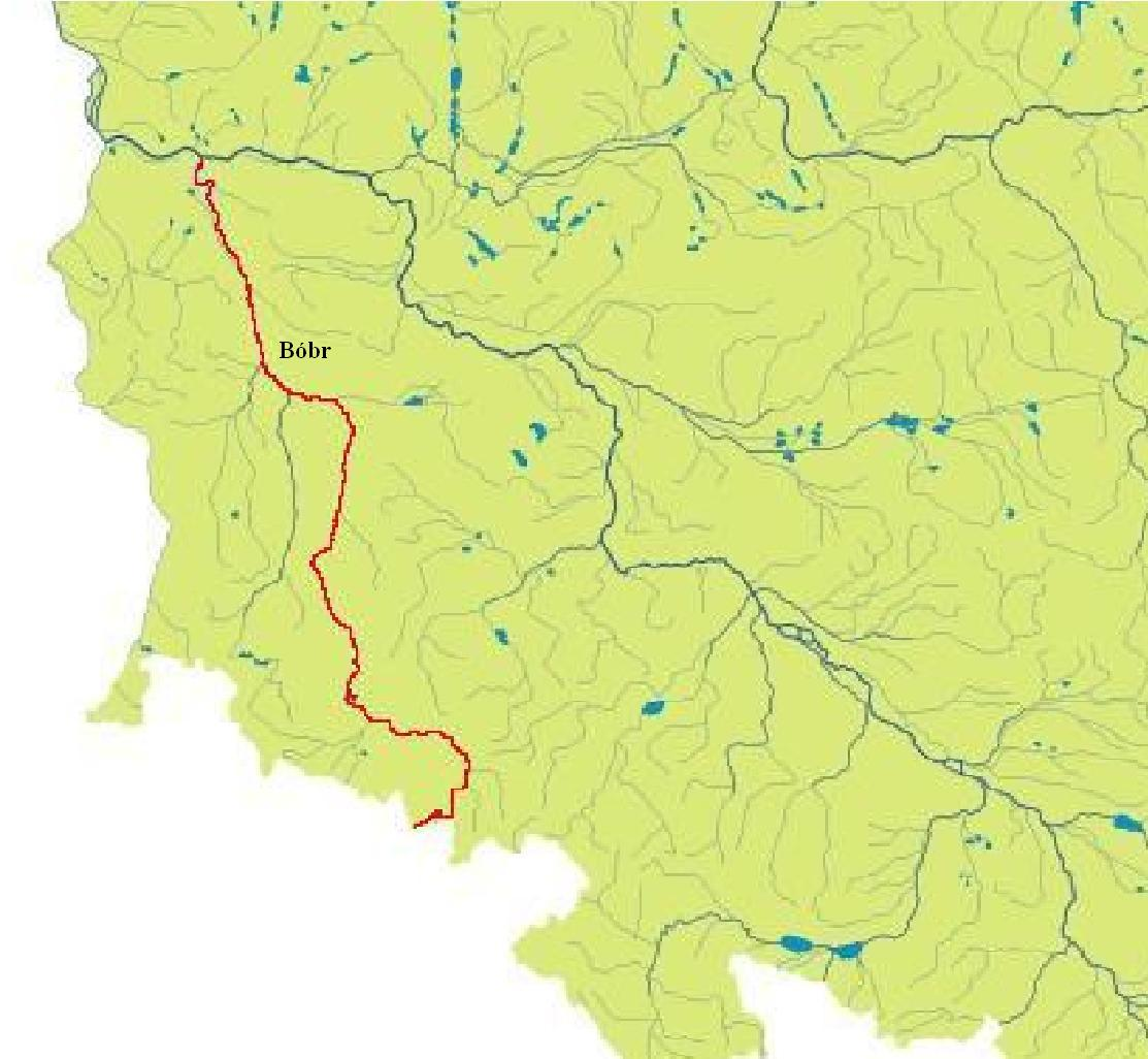 Wycinek mapy hydrograficznej Polski z zaznaczeniem rzeki Bóbr.